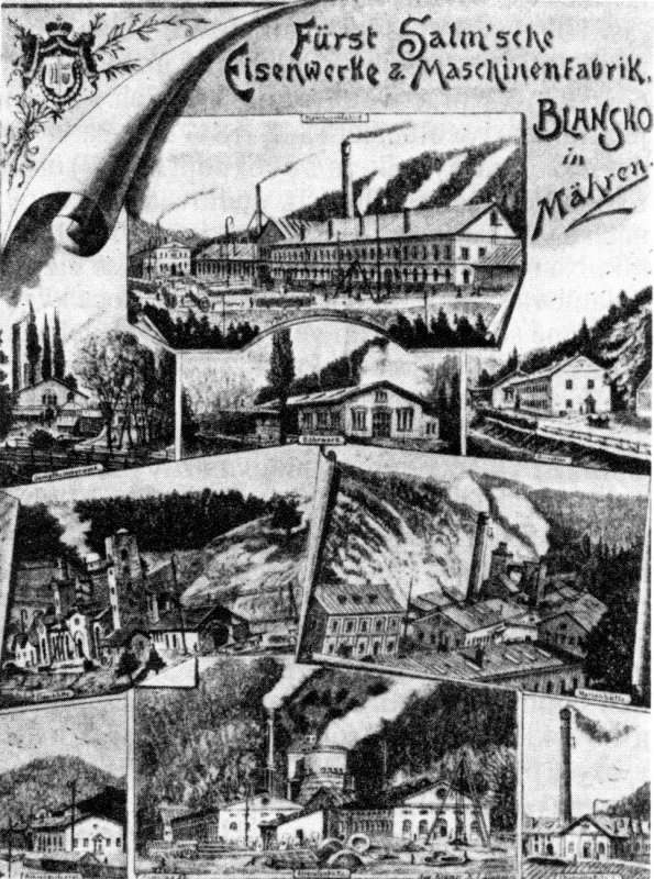 Blansko, titulní list starého ceníku s vyuobrazením všech závodů blanenských železáren v 80. letech 19. století